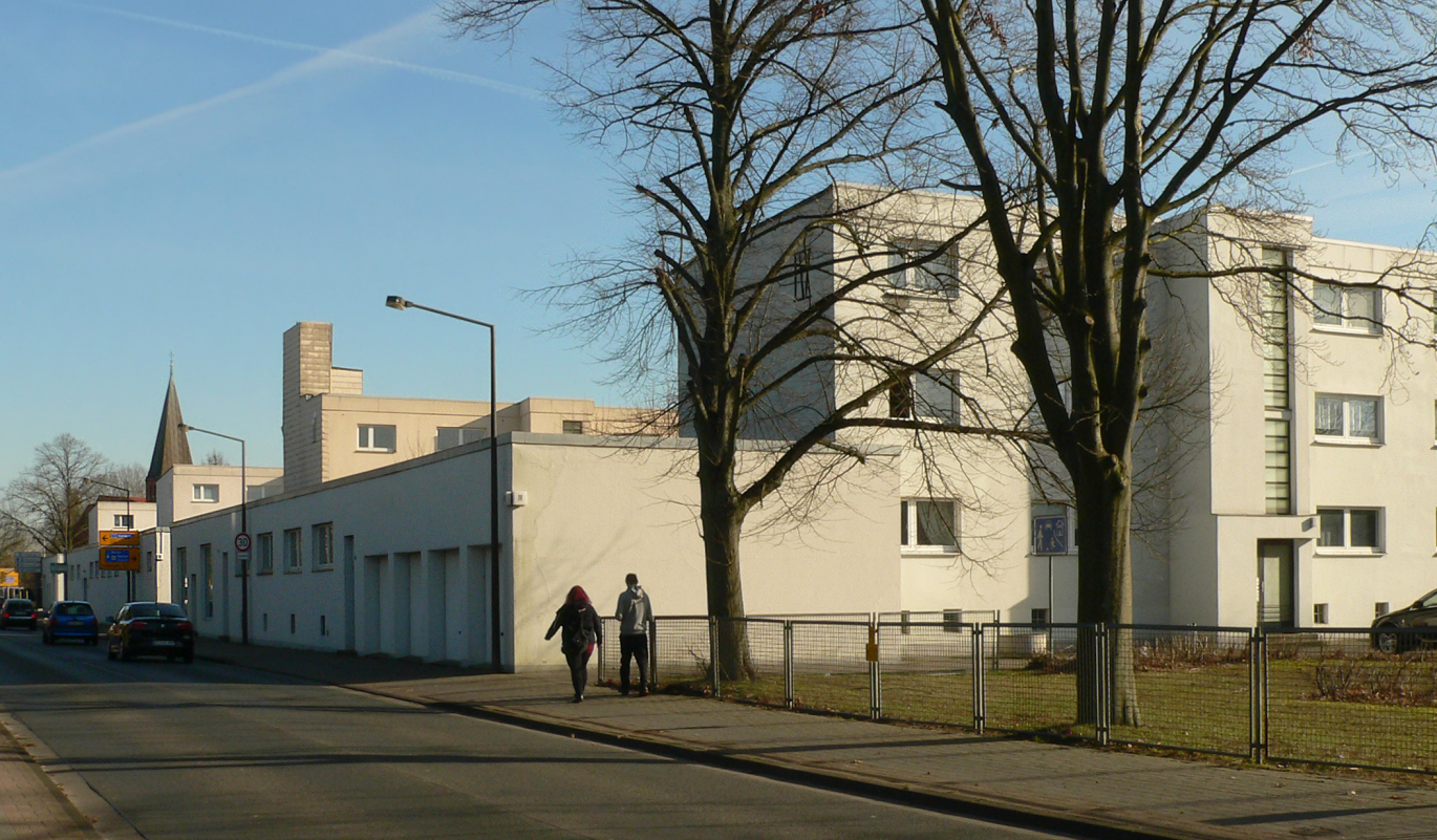 Siedlung Georgsgarten in Celle mit flachen Blocks